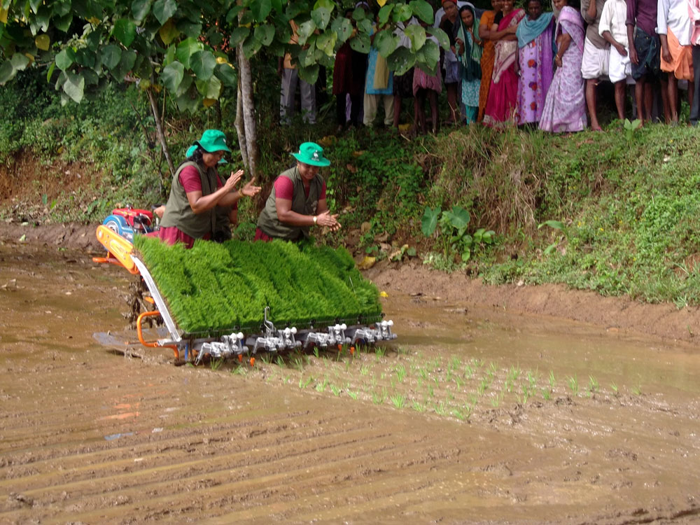 നടീൽ പ്രവർതതനം